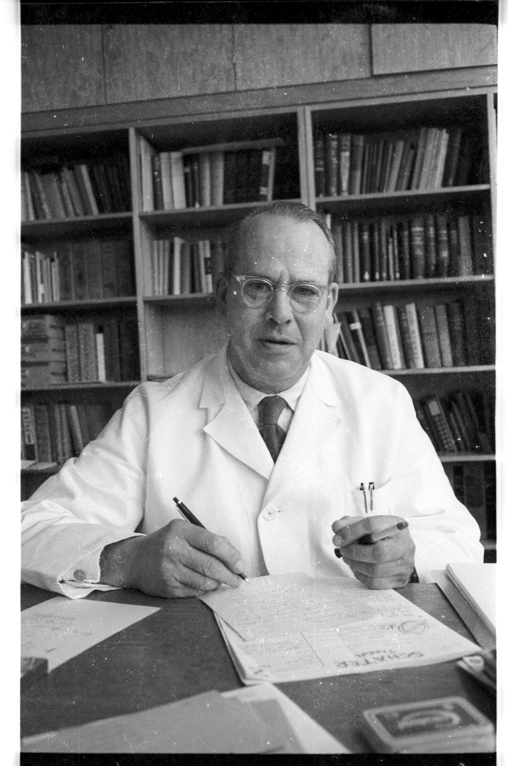 Anatom und Dekan der Medizinischen Fakultät der Christian-Albrechts-Universität (CAU).